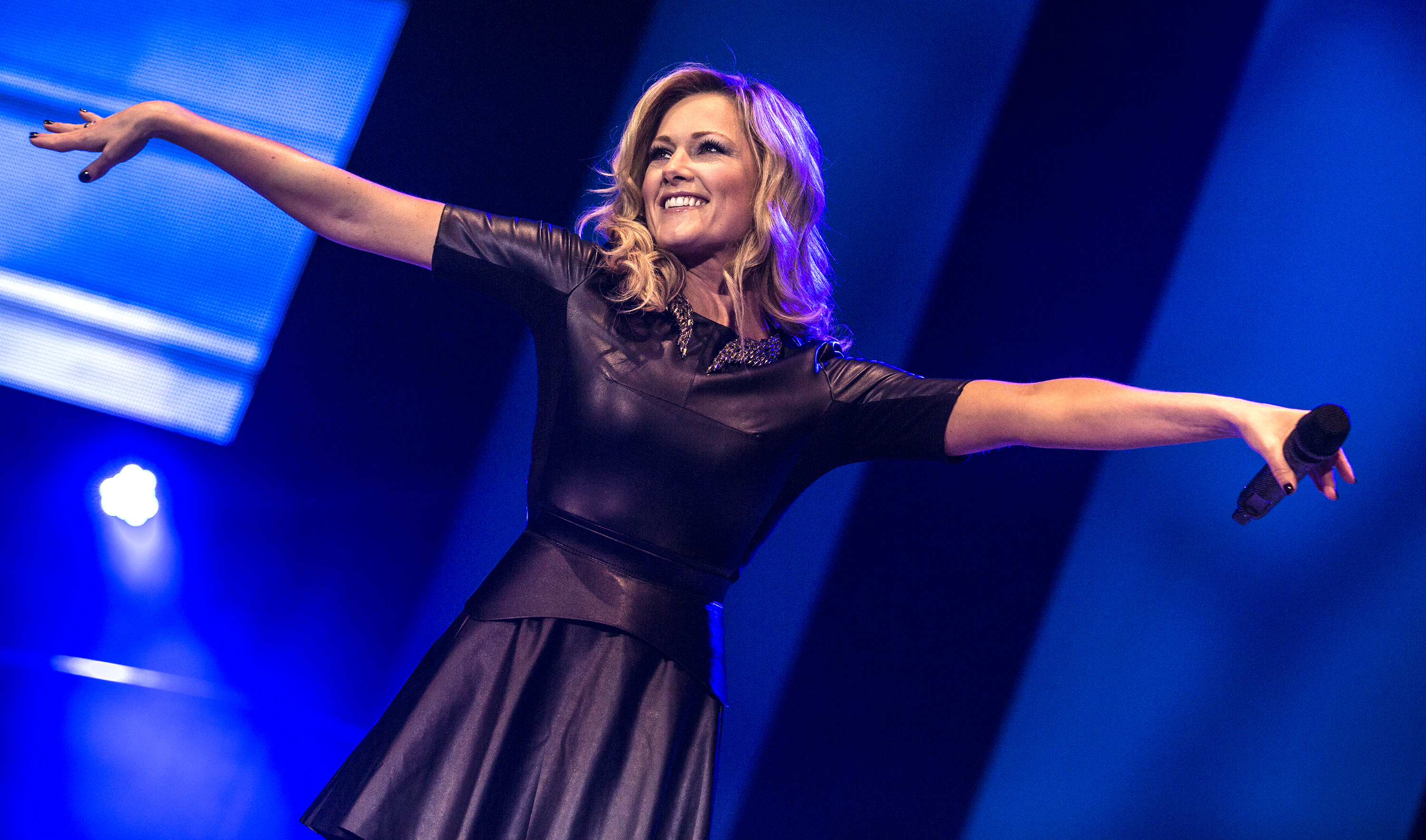 Schlagersängerin Helene Fischer in der Festhalle Frankfurt.